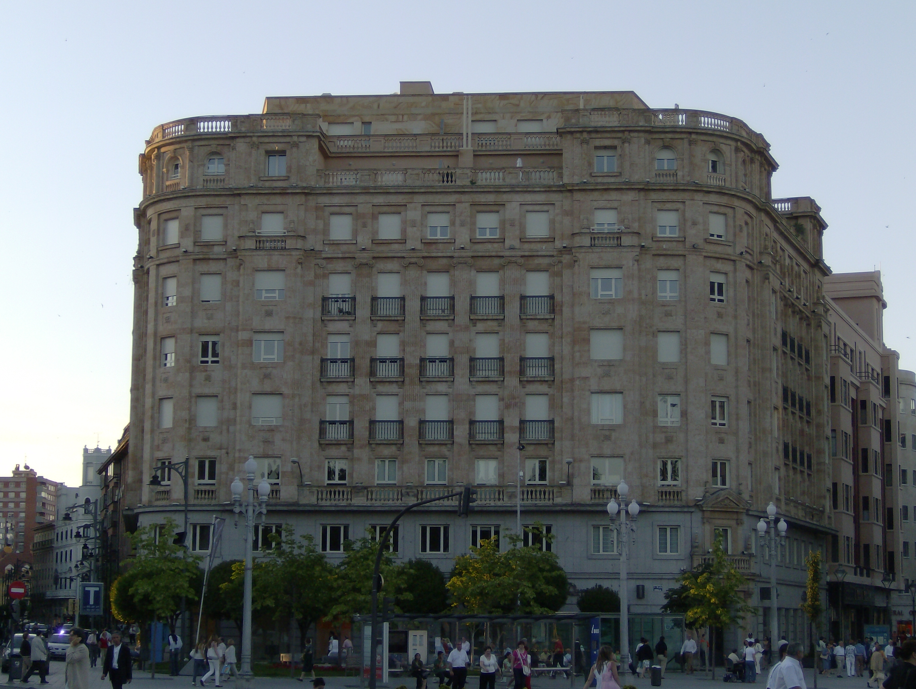 Plaza Zorrilla (Valladolid)